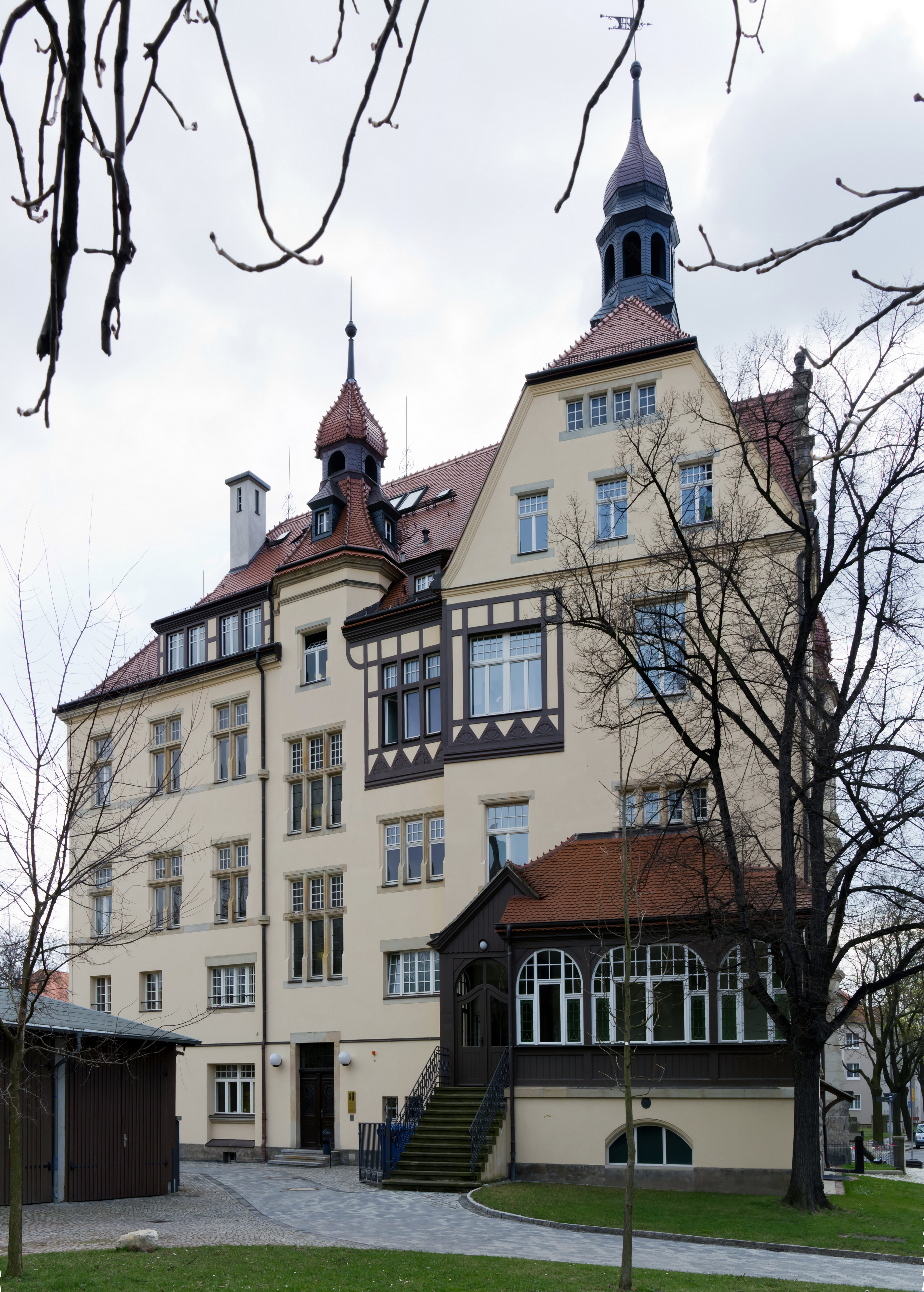 Rathaus Leuben, Dresden (Rathaus Leuben)